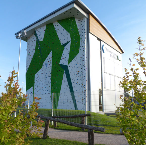 Kletterzentrum Blau-Weiss Buchholz mit bekletterbarer Außenwand im Herbst 2013